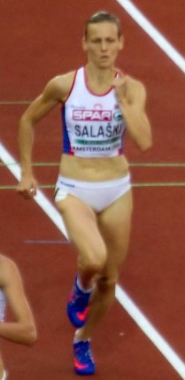 5266 finale 400m dames